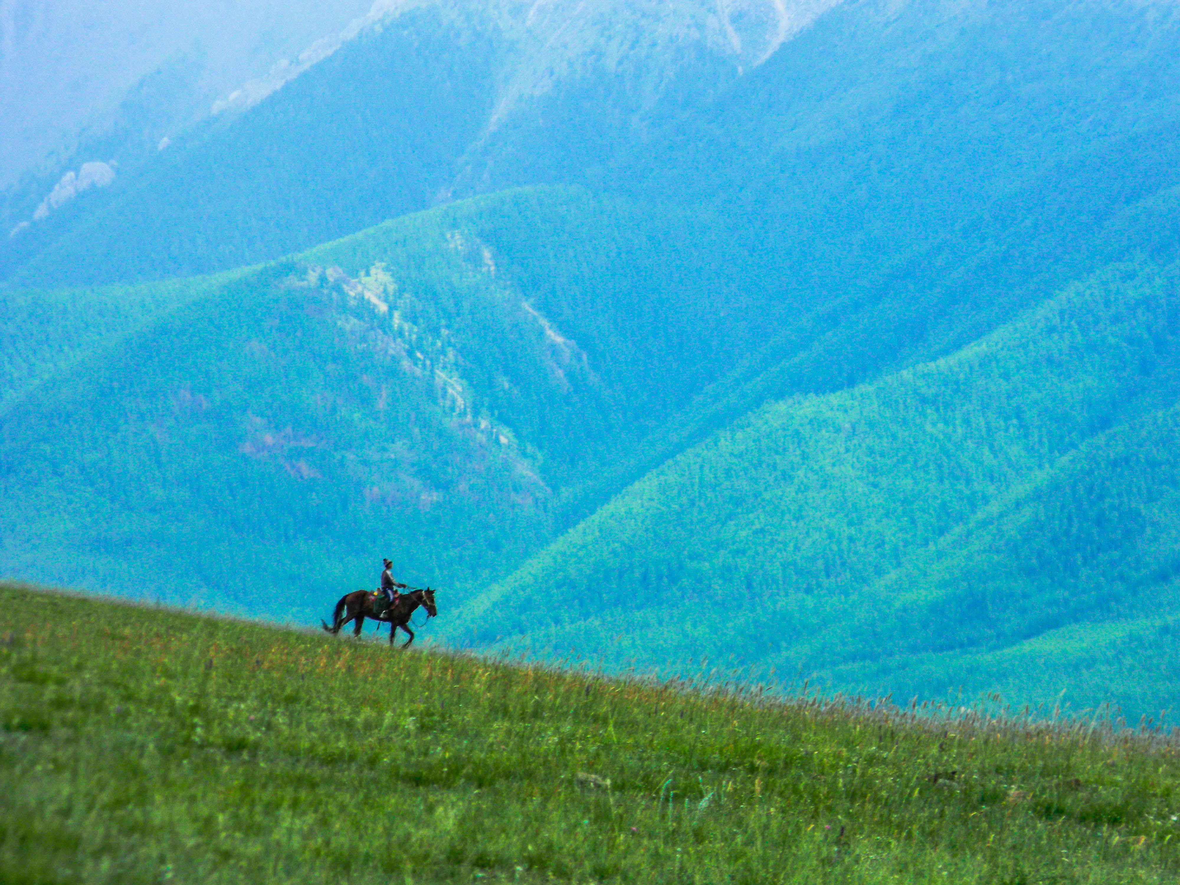 горы Танды-уула, республика Тыва, Чеди-хольсикй кожуун.